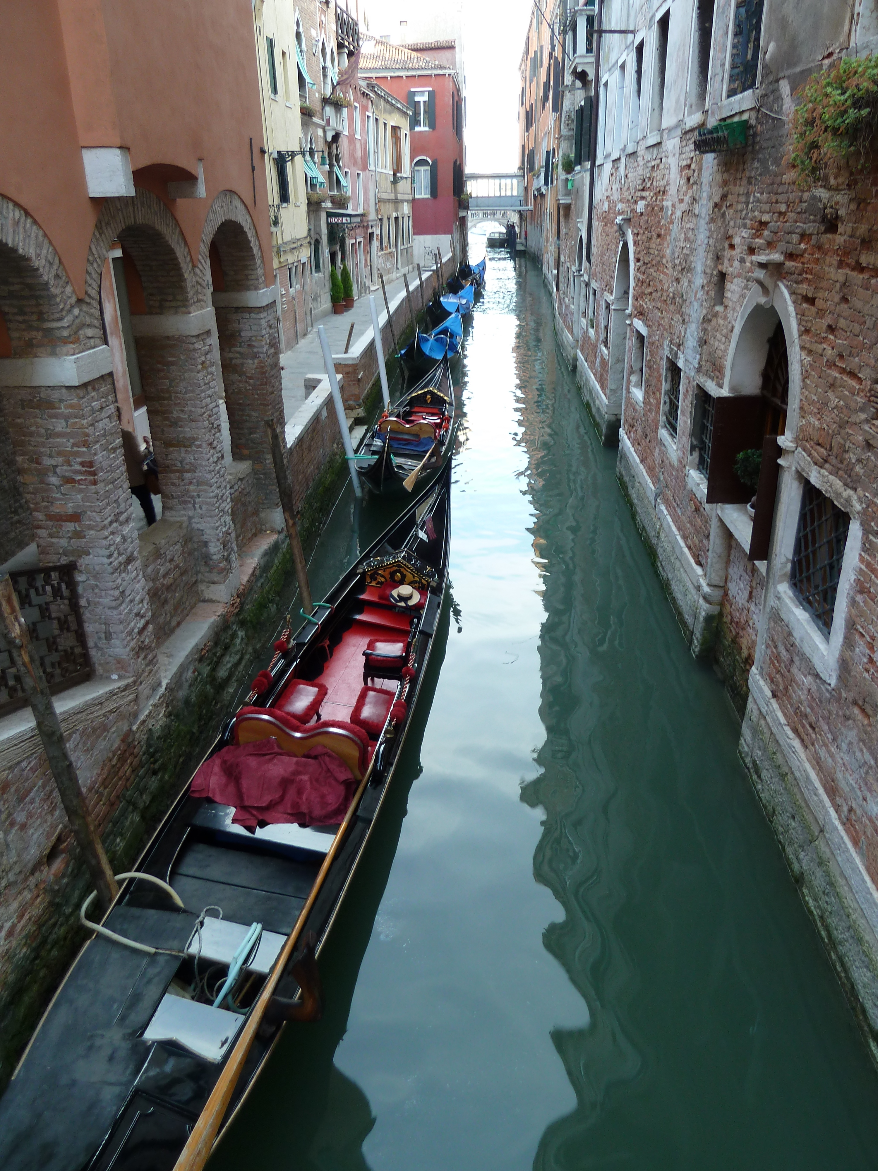 Rio del Vin (Venice)